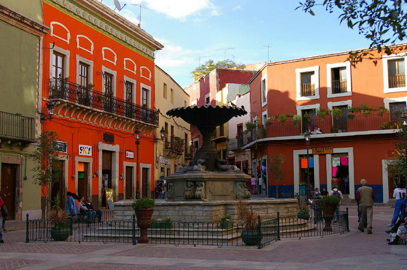 Guanajuato (city), Guanajuato.